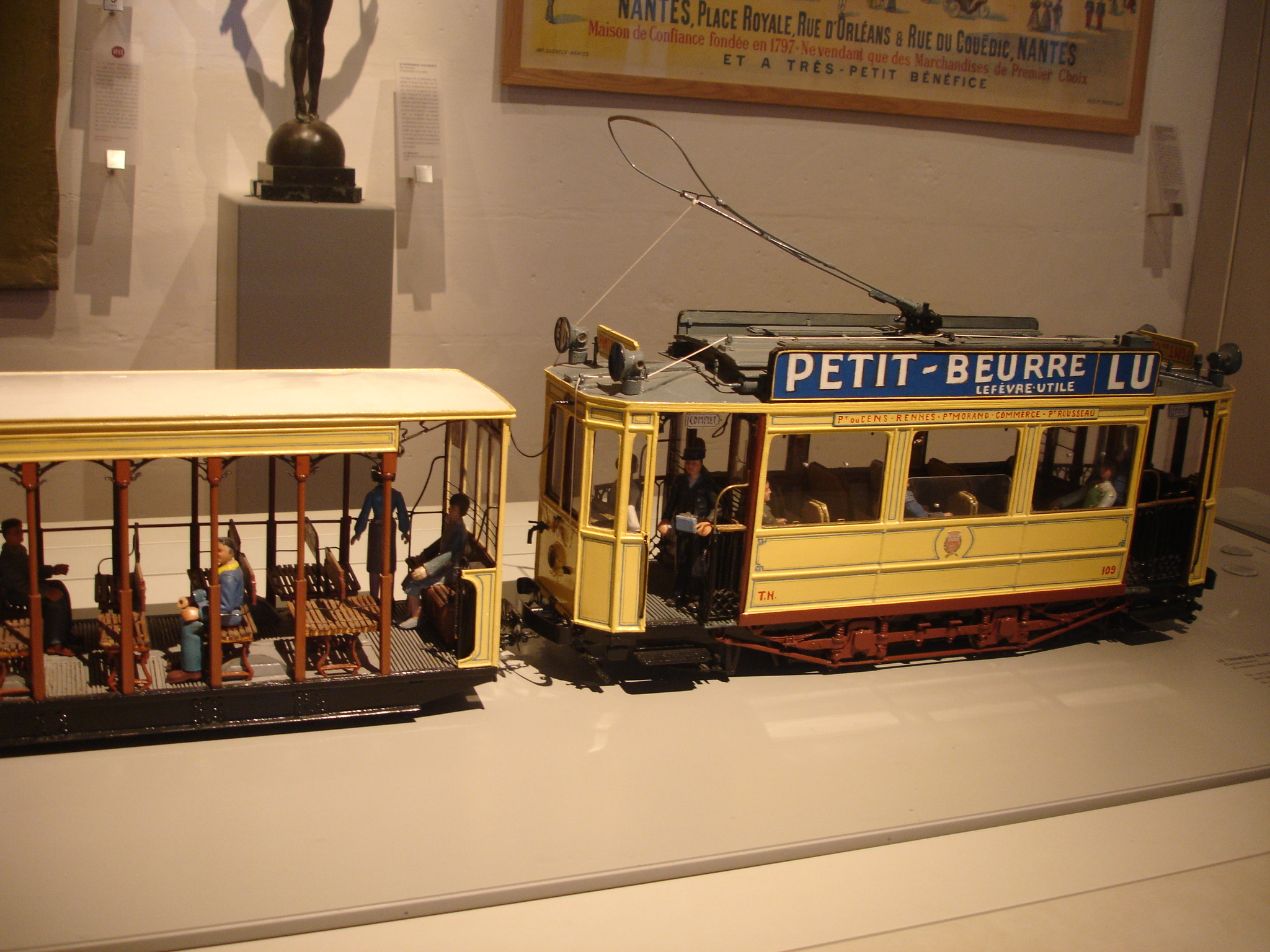 Maquette du tramway de Nantes avec une publicité pour LU - photo prise au Musée du château des ducs de Bretagne de Nantes